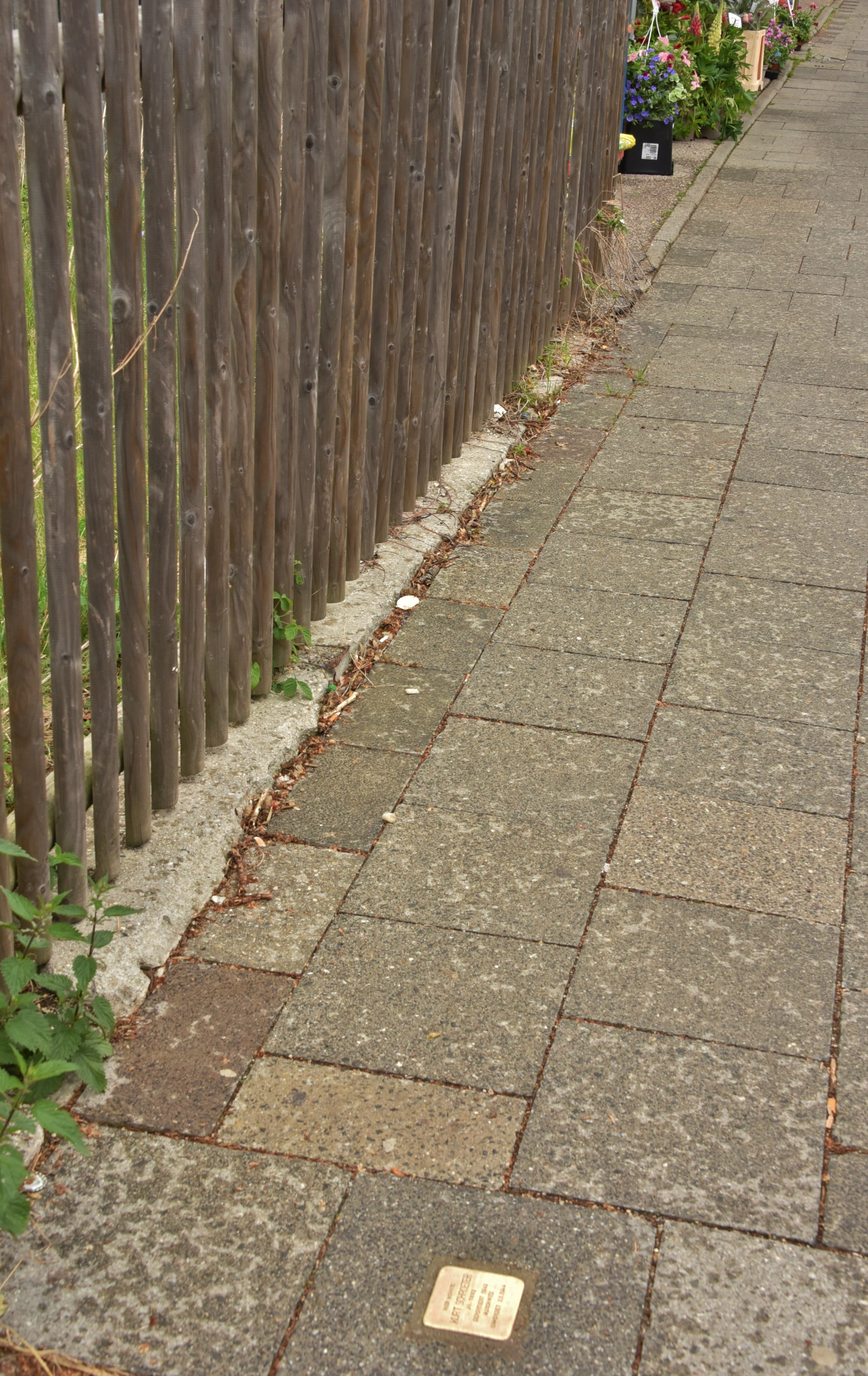 Stolperstein in Gröbenzell